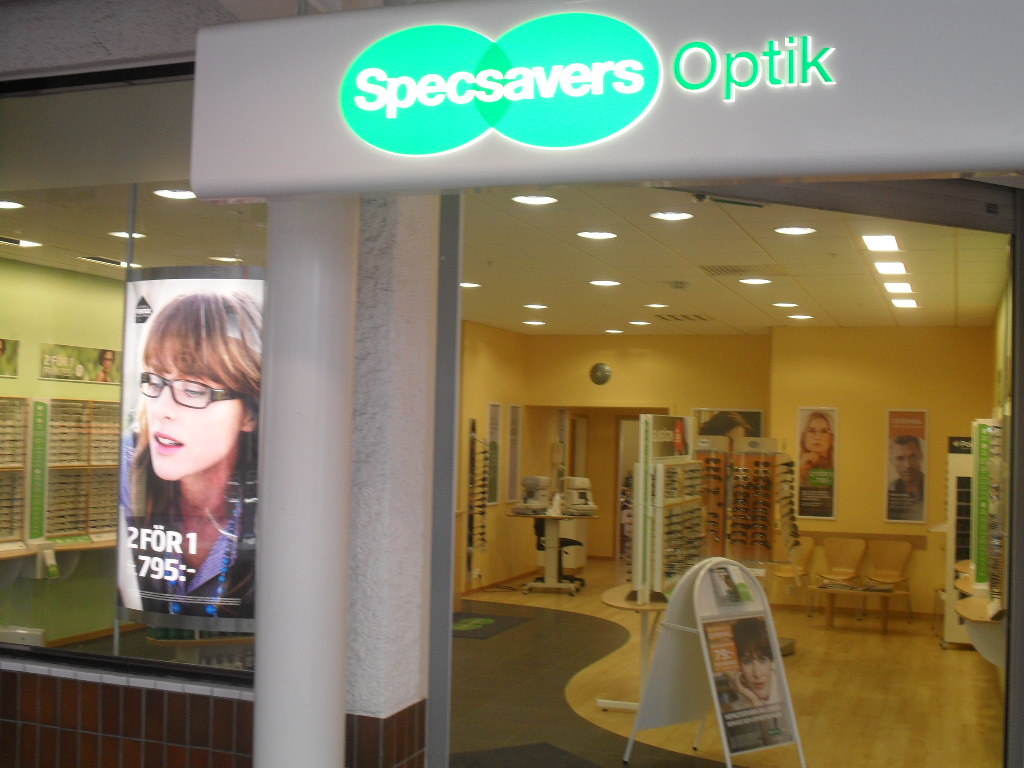 Affär i Stockholm